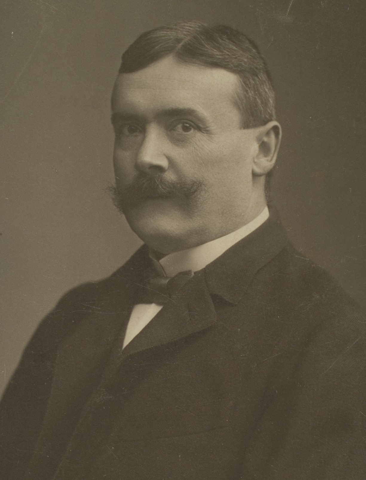 Daniel Häberle, Geologe und Paläontologe, 1917–1934 Professor in Heidelberg